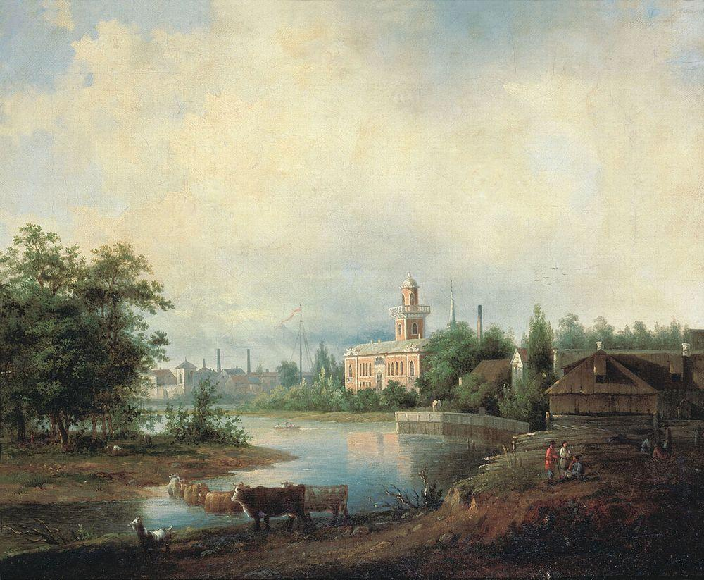 «Пейзаж с рекой. Екатерингоф». 1844. Холст, масло. 39.5 x 50.5 см. Государственная Третьяковская галерея. Работа иногда приписывается пейзажисту Валериану Каменеву[1], но это не верно, так как в правом нижнем углу полотна имеется подпись красной краской Иванова.[2] На картине изображен павильон Ферма (не сохранился)